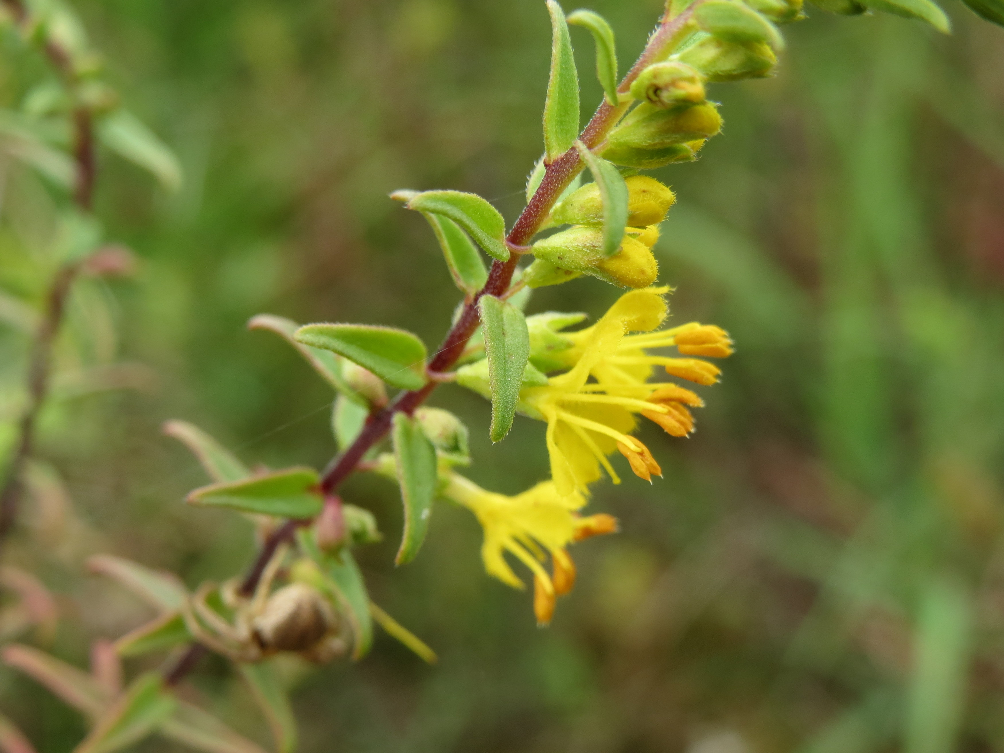 Gelber Zahntrost (Odontites luteus) im Mainzer Sand